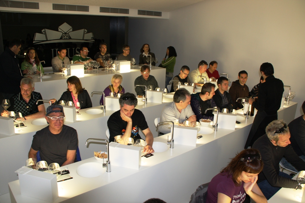 Sala de Cata de Bodegas Irius, España. 2010.